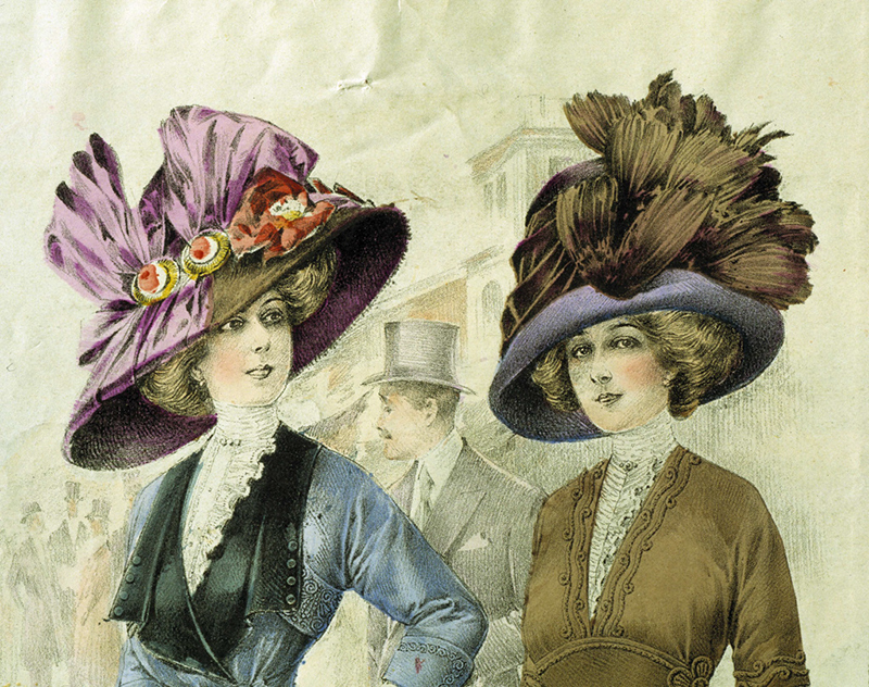 Mode. Hattar. Modeplansch från 1911.